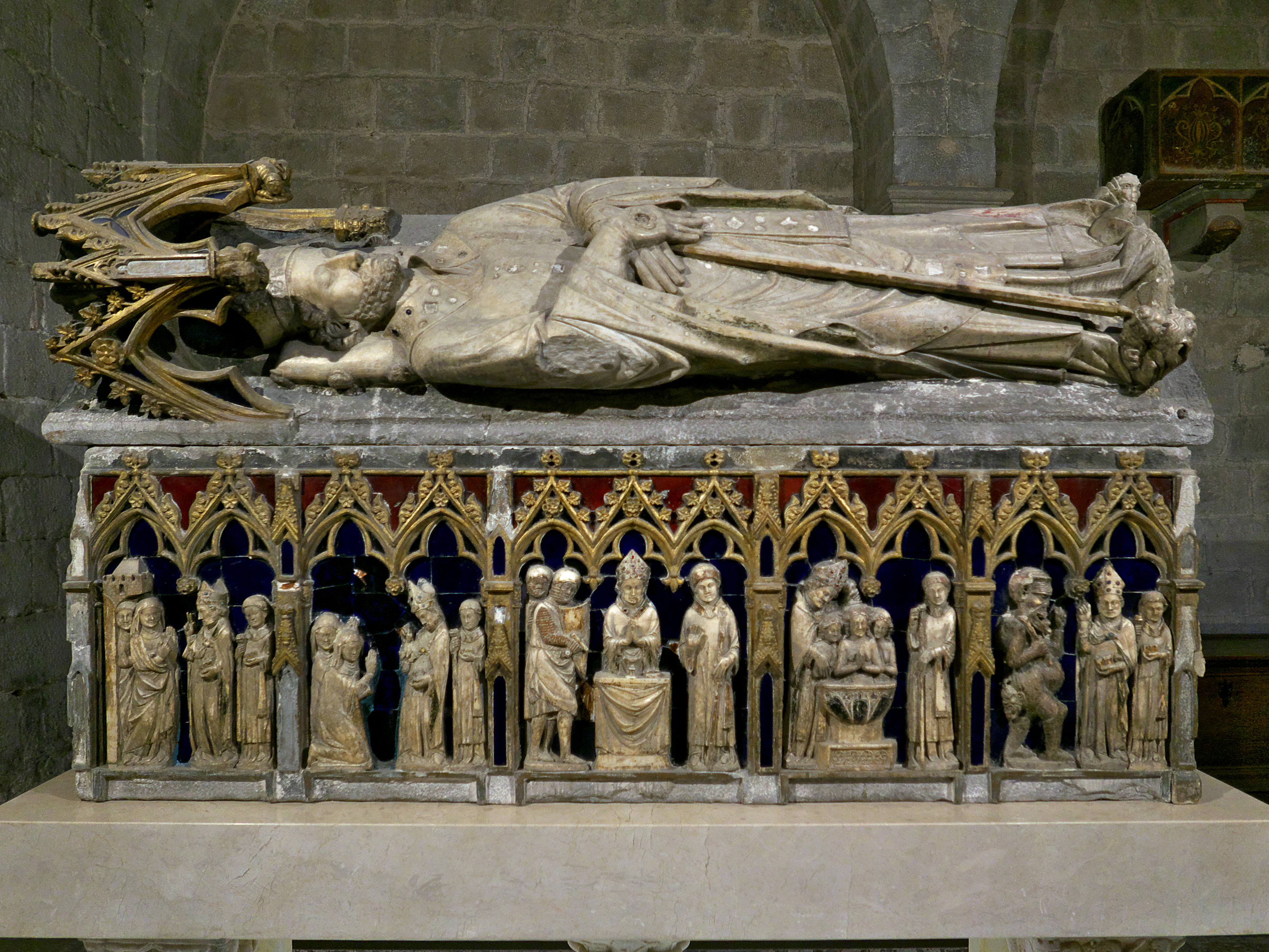 Iglesia de San Félix (Gerona). Tallado en alabastro por el flamenco Juan de Tournai (1326-1328).